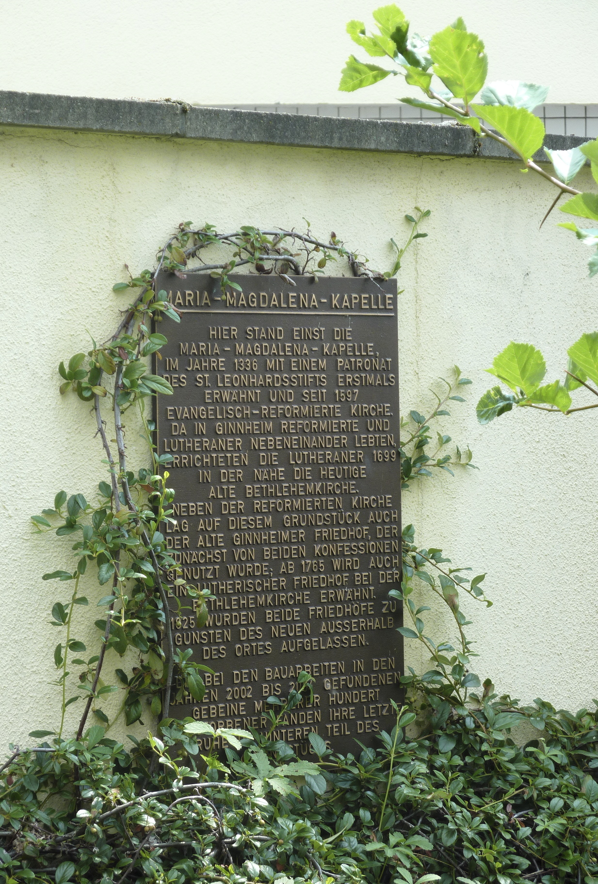 Frankfurt am Main, Stadtteil Ginnheim: Die Maria-Magdalena-Kapelle war ein im Jahr 1336 erstmals urkundlich erwähntes Kirchengebäude im Ortsteil Alt-Ginnheim. Seit 1597 war die Kapelle eine evangelisch-reformierte Kirche. Zu Beginn des 21. Jahrhunderts wurden bei Bauarbeiten Reste der Kirche sowie des umliegenden Friedhofs wiederentdeckt. Die dort gefundenen menschlichen Gebeine wurden umgebettet; vor Ort wurde eine Erinnerungsstätte eingerichtet. Das Foto zeigt die Gedenktafel vor Ort mit Informationen zur Geschichte der Kirche